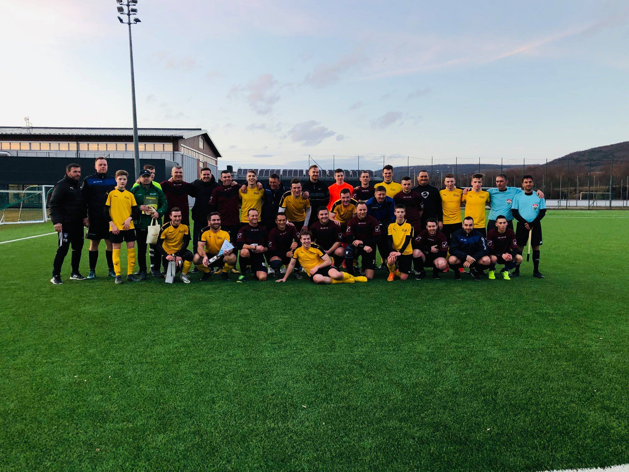 Közös csapatfotó az edzőtáborban